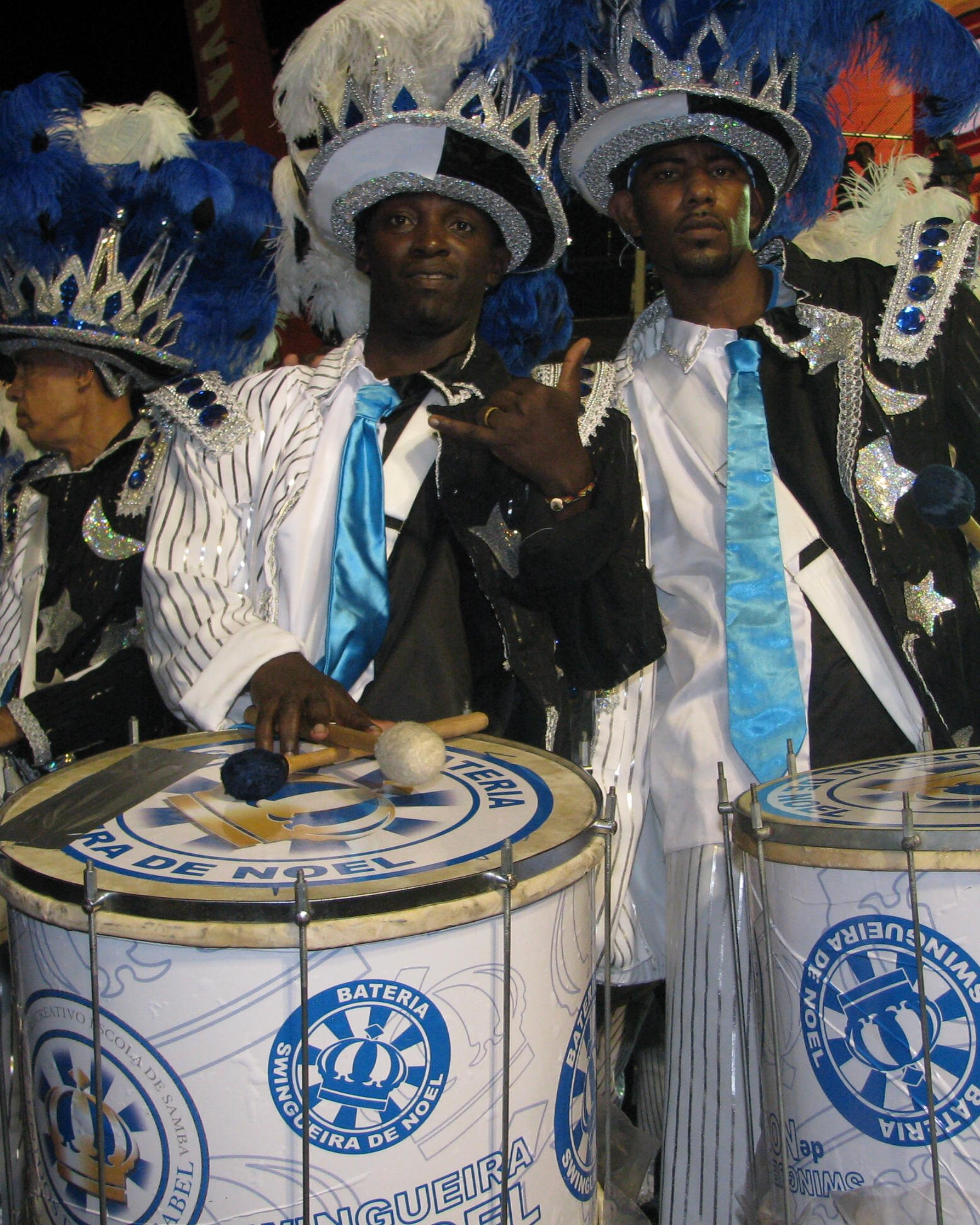 Vila Isabel 01